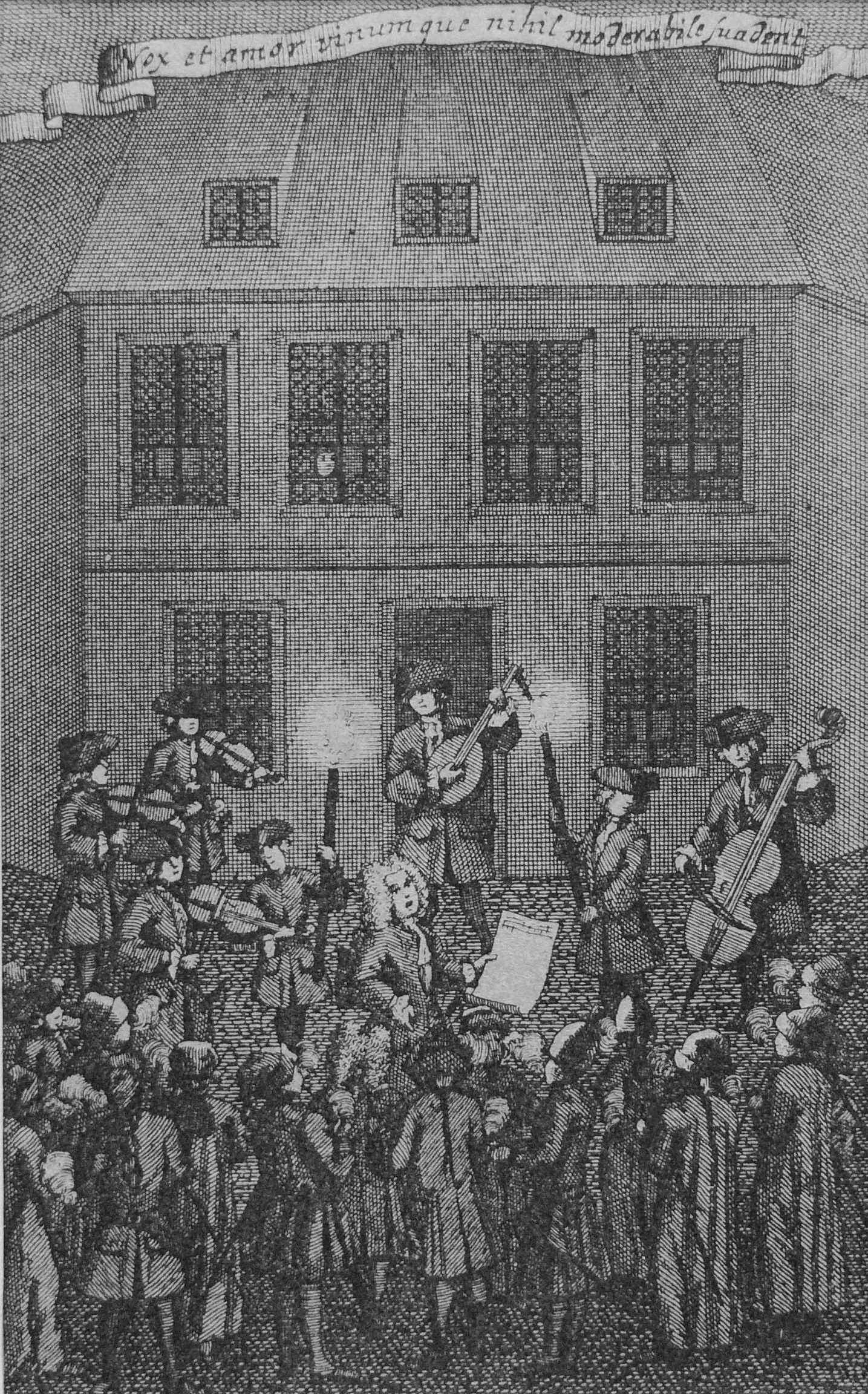 Collection: Café und Museum "Zum arabischen Coffe Baum", Leipzig Musizierende Studenten (Collegium Musicum), Leipzig 1727, Kupferstich